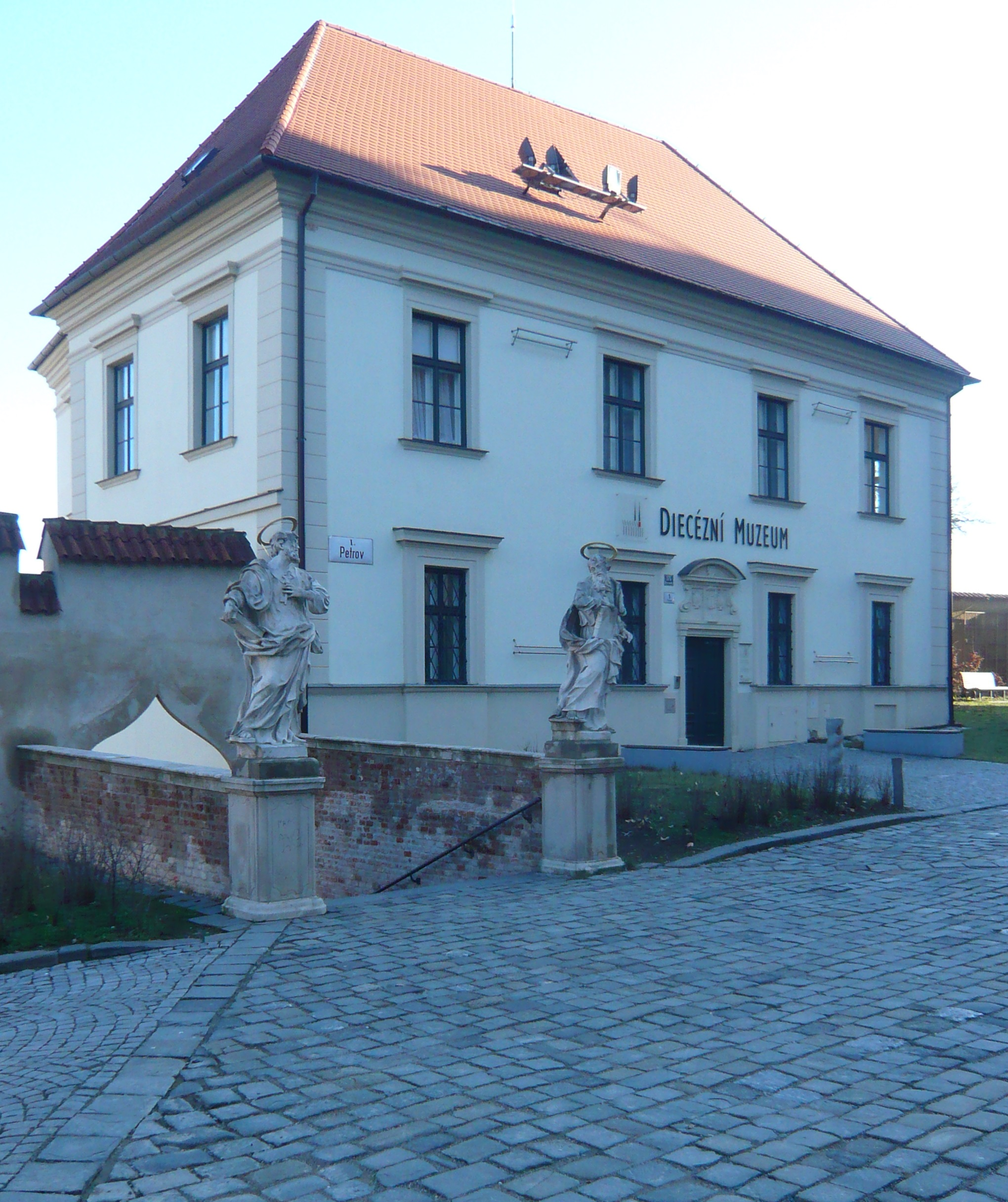 Hlavní budova diecézního muzea v Brně, bývalý kanovnický dům z období ranné renesance